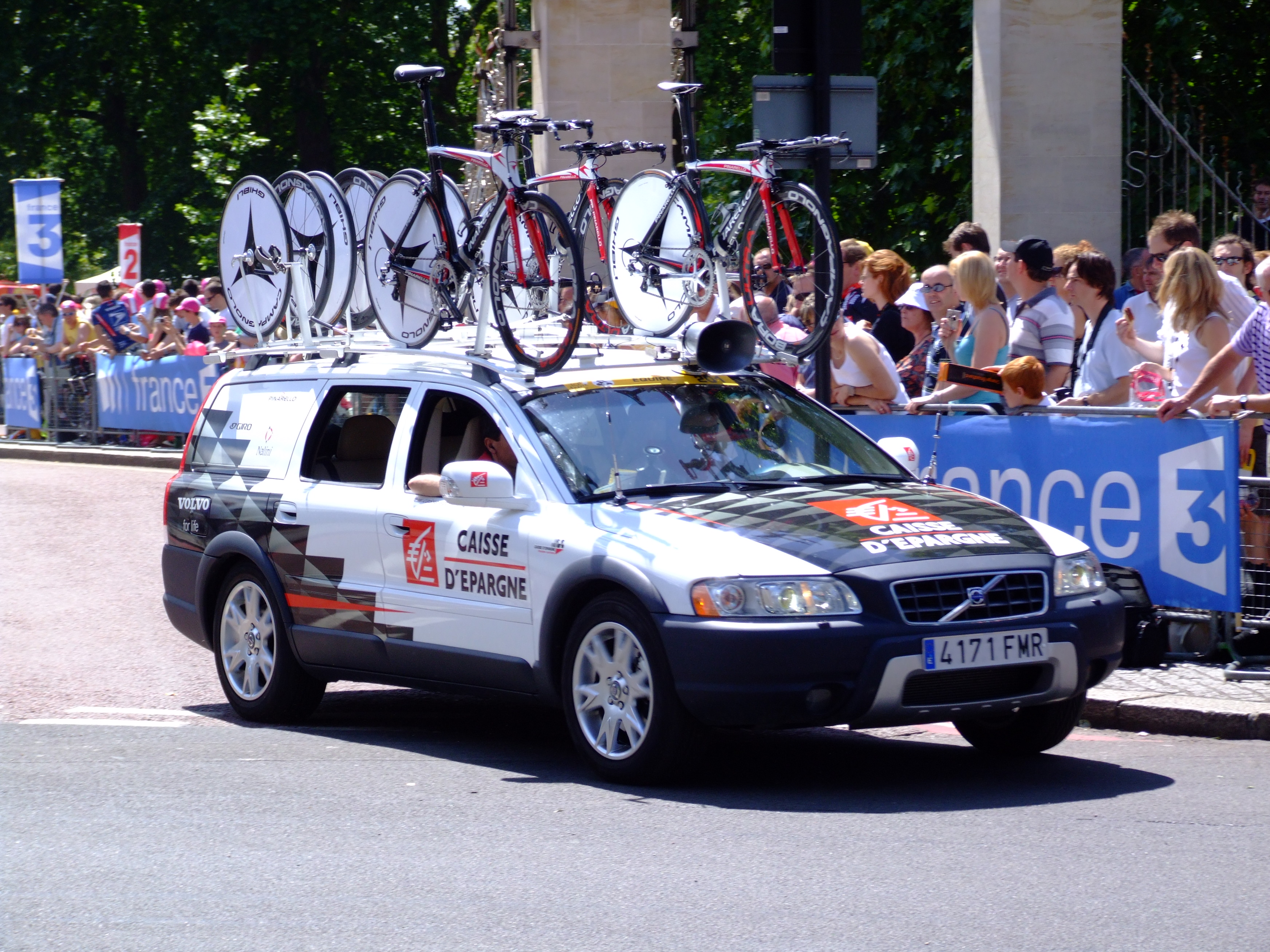 Caisse d'Epargne (Tour de France 2007).